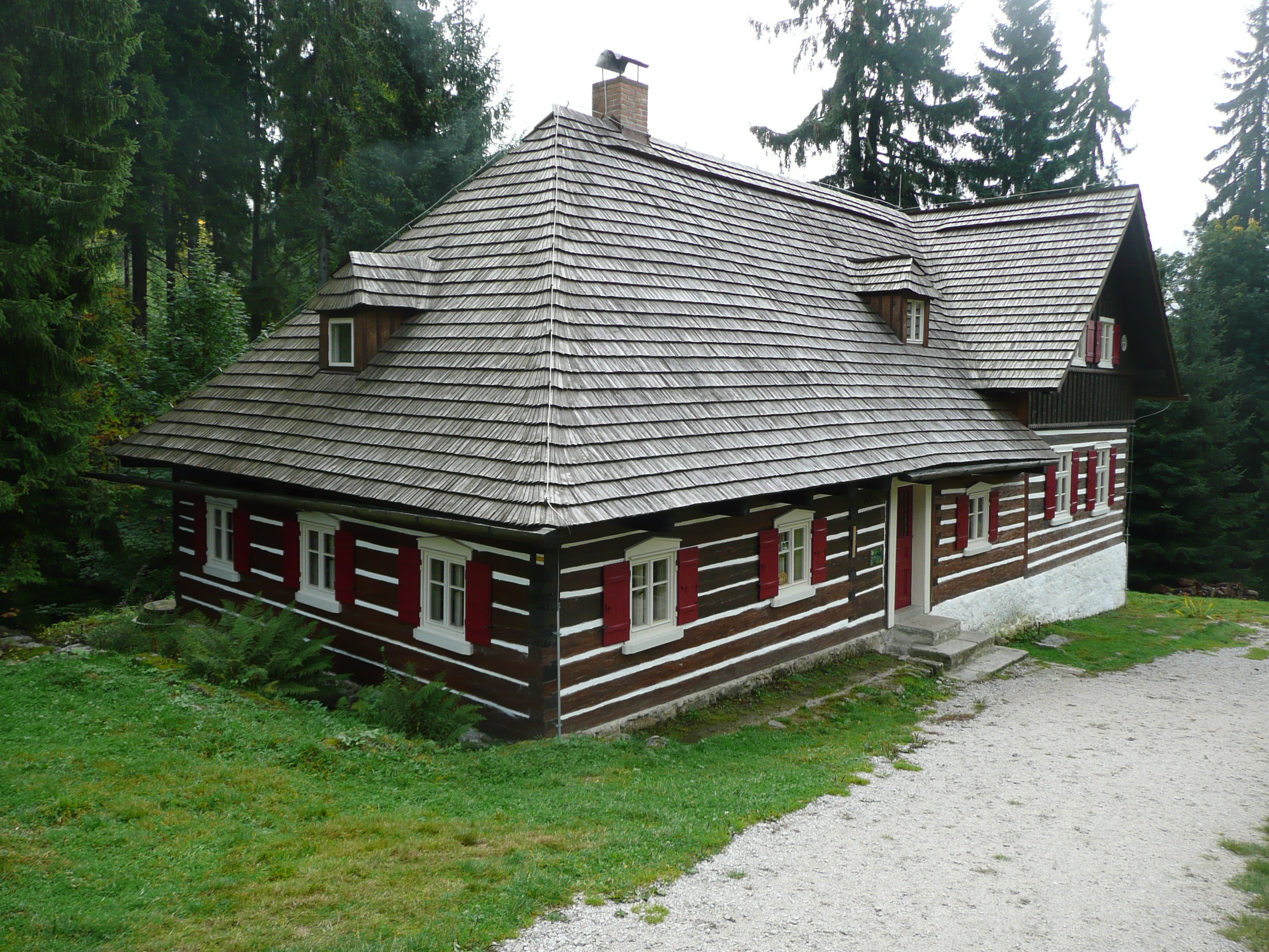 Fuchsbaude bei Kristianov im Isergebirge